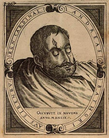 Somlyói Báthory András (IV. András) (Szilágysomlyó, 1563 – Csíkszentdomokos, 1599. október 31.) bíboros, később hét hónapig Erdély fejedelme; Báthory András szatmári kapitány és Majláth Margit fia. Báthory István lengyel király unokaöccse, testvére Báthory Boldizsár, unokatestvére Zsigmond fejedelem volt.